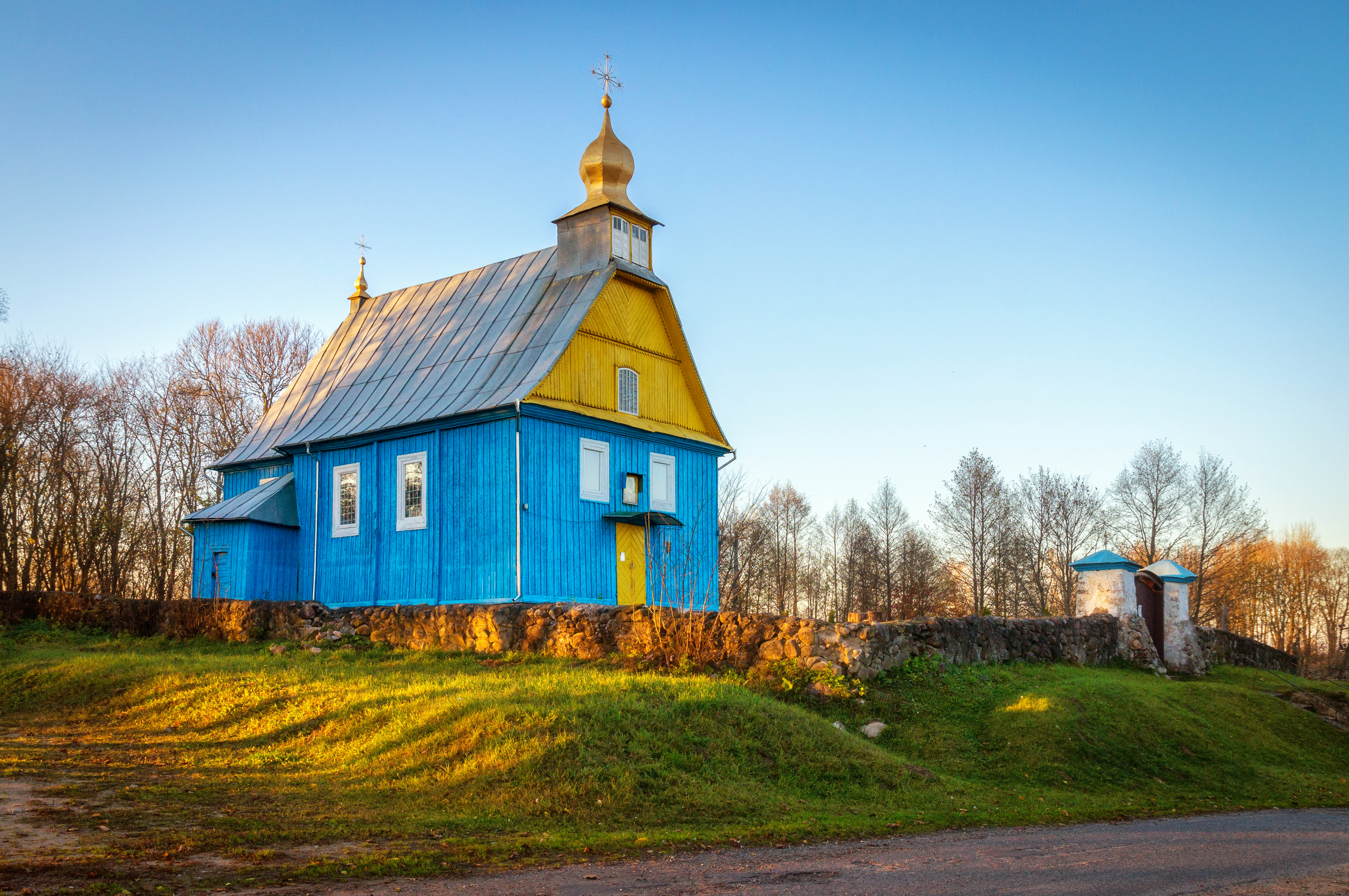 Свята-Мікалаеўская царква (Латыгаль) This is a photo of Belarusian heritage monument. Reference number: 612Г000126 ( WLM)